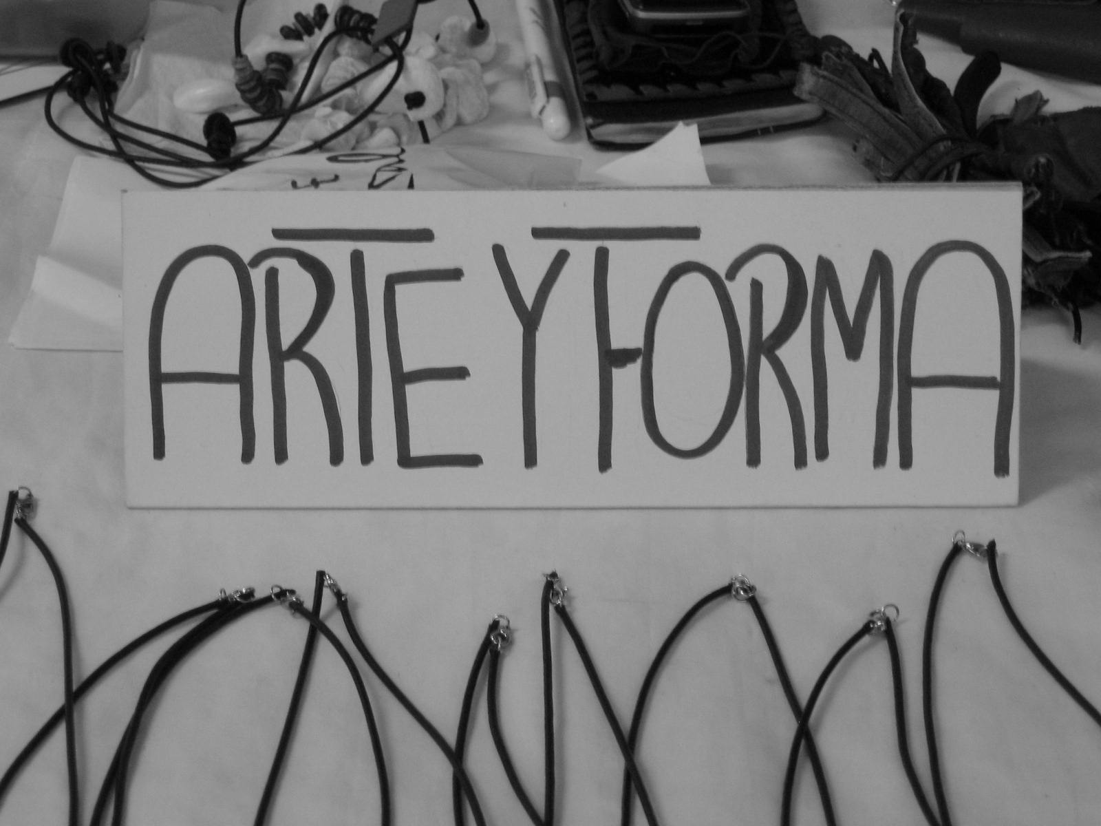 Foto tomada en La Casa del Artesano en Coyoacán